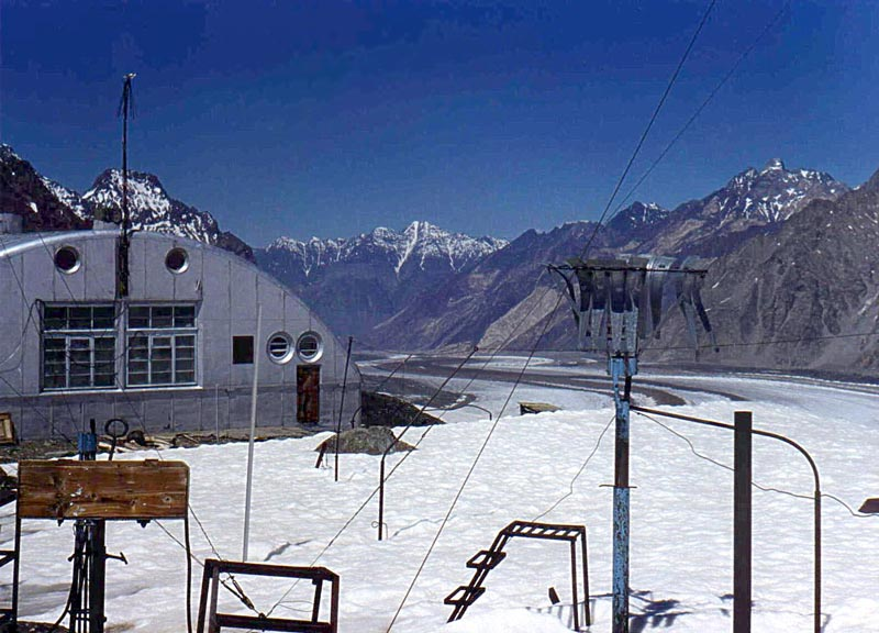 Фотография гидро-метеостанции на леднике Федченко, Памир